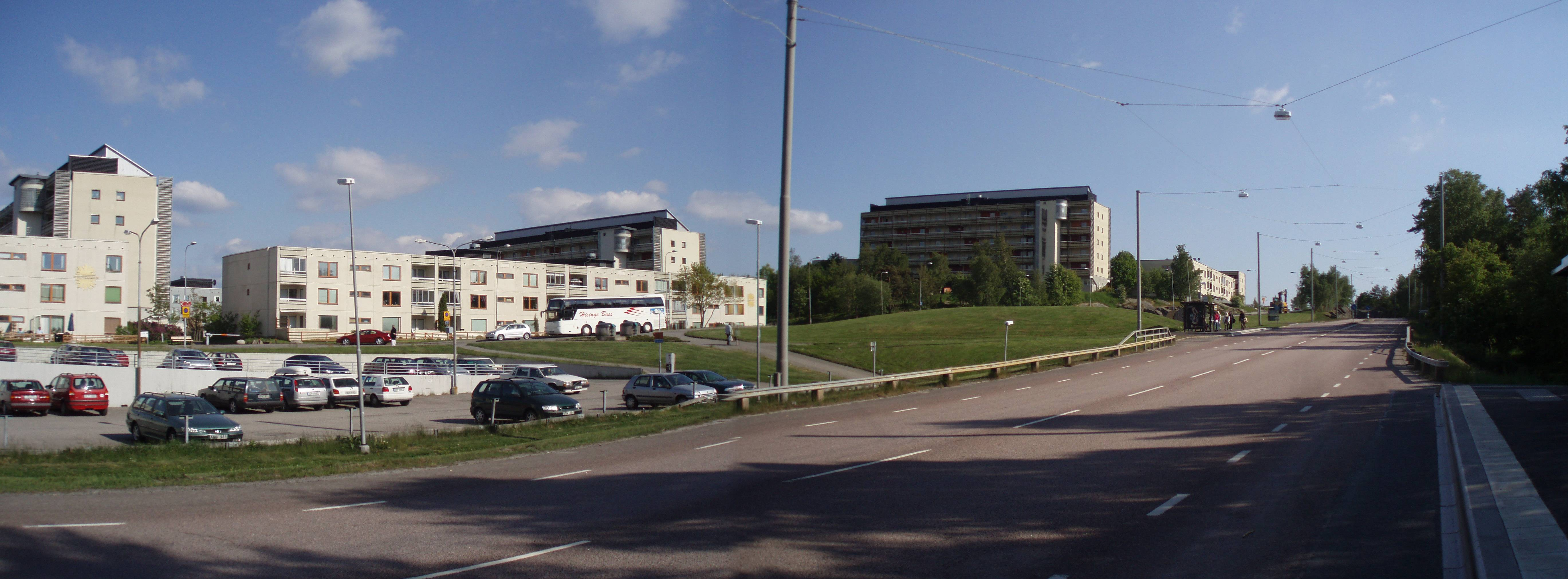 Kanelgatan, Gårdsten